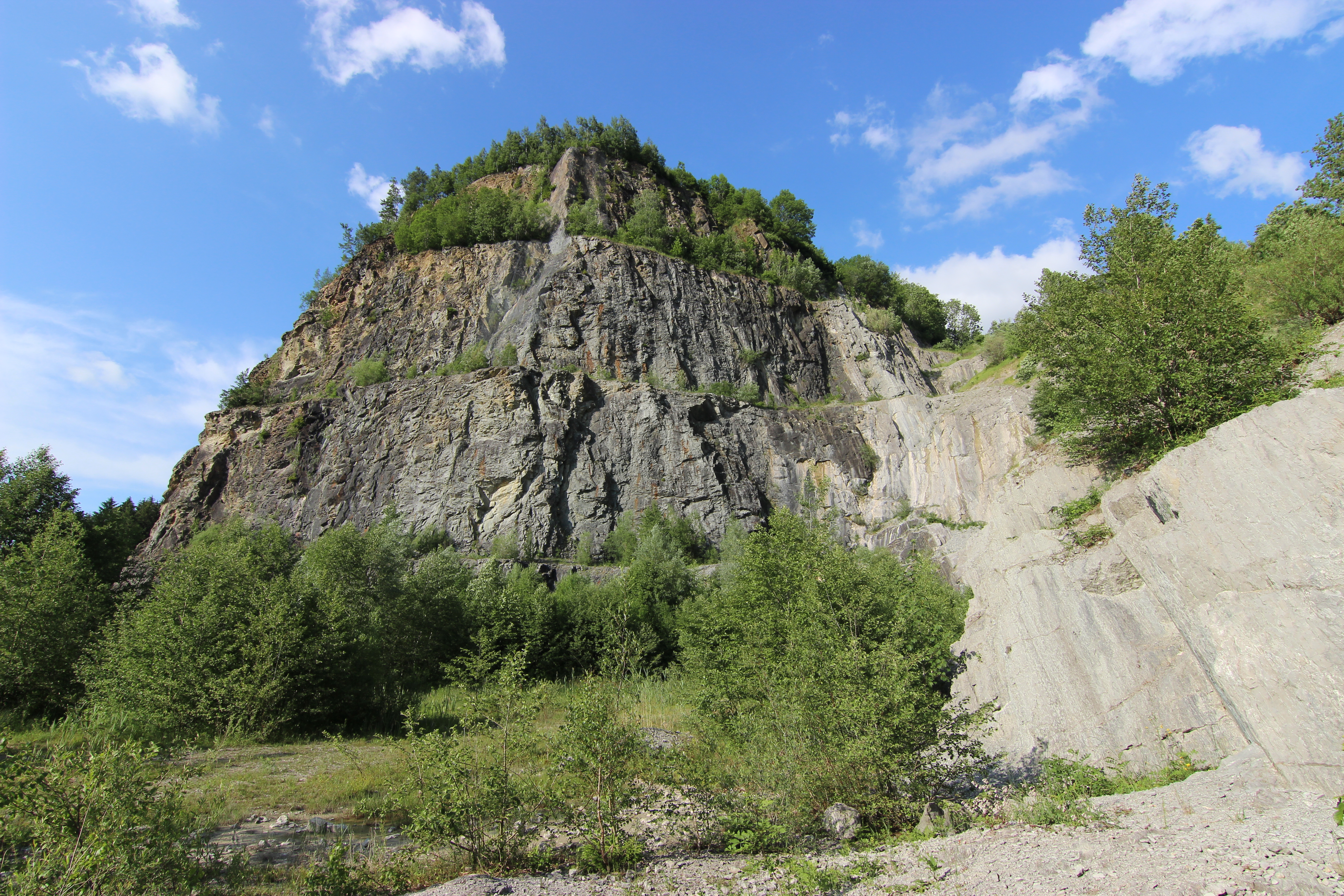 Steinbruch an der Schanz